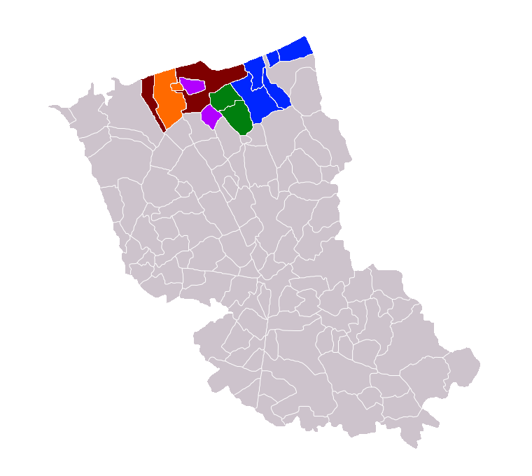 Dunkerque et ses quatre cantons